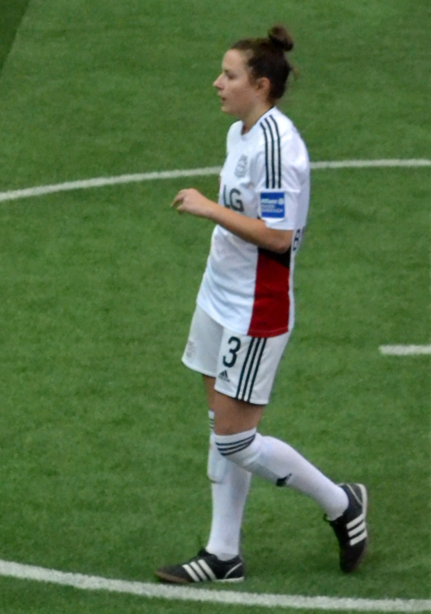 Laura Leluschko (Bayer Leverkusen) beim SAP Frauen-FußballCup 2016